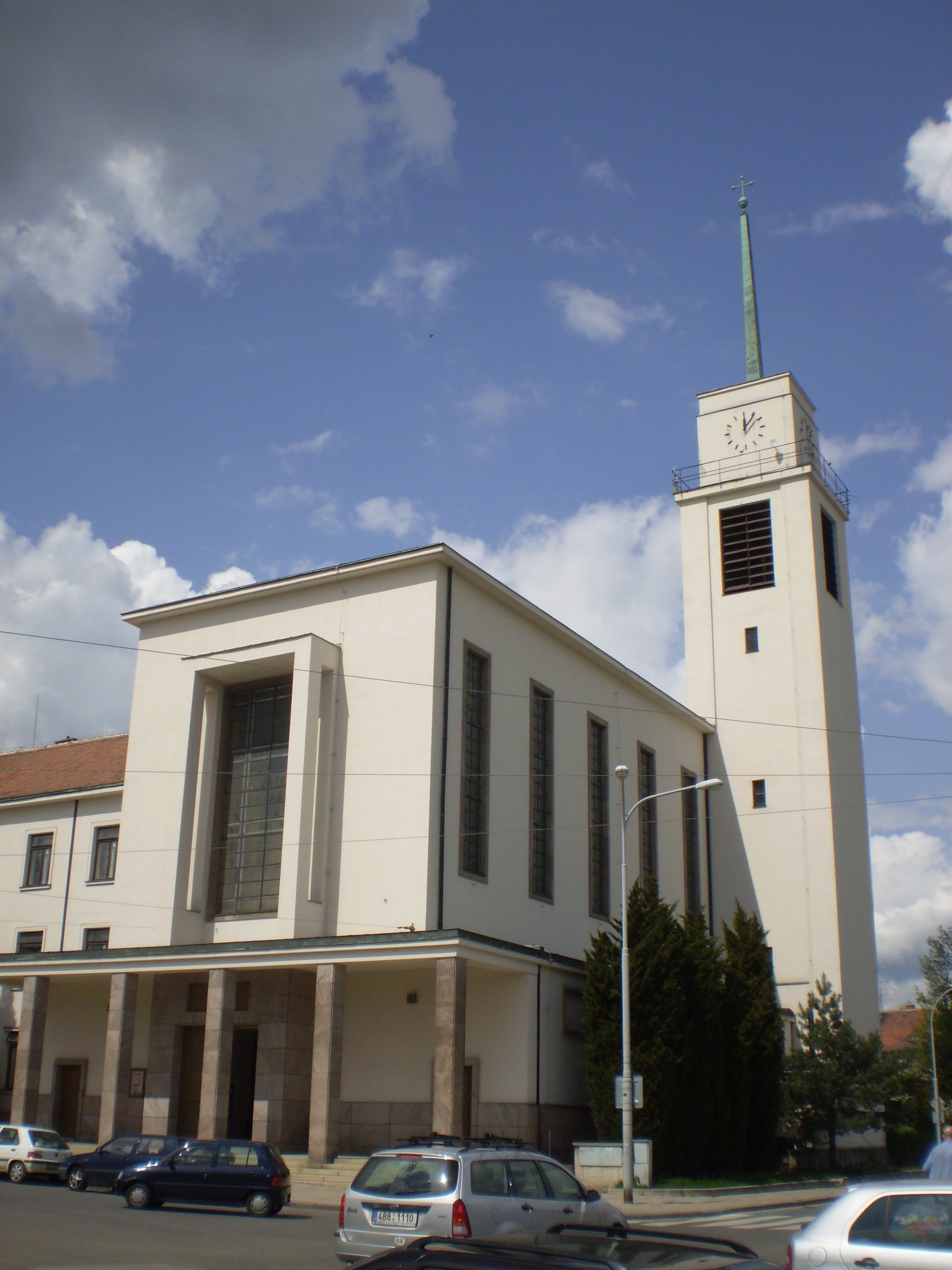 Kostel sv. Augustina. Brno, Masarykova čtvrť.